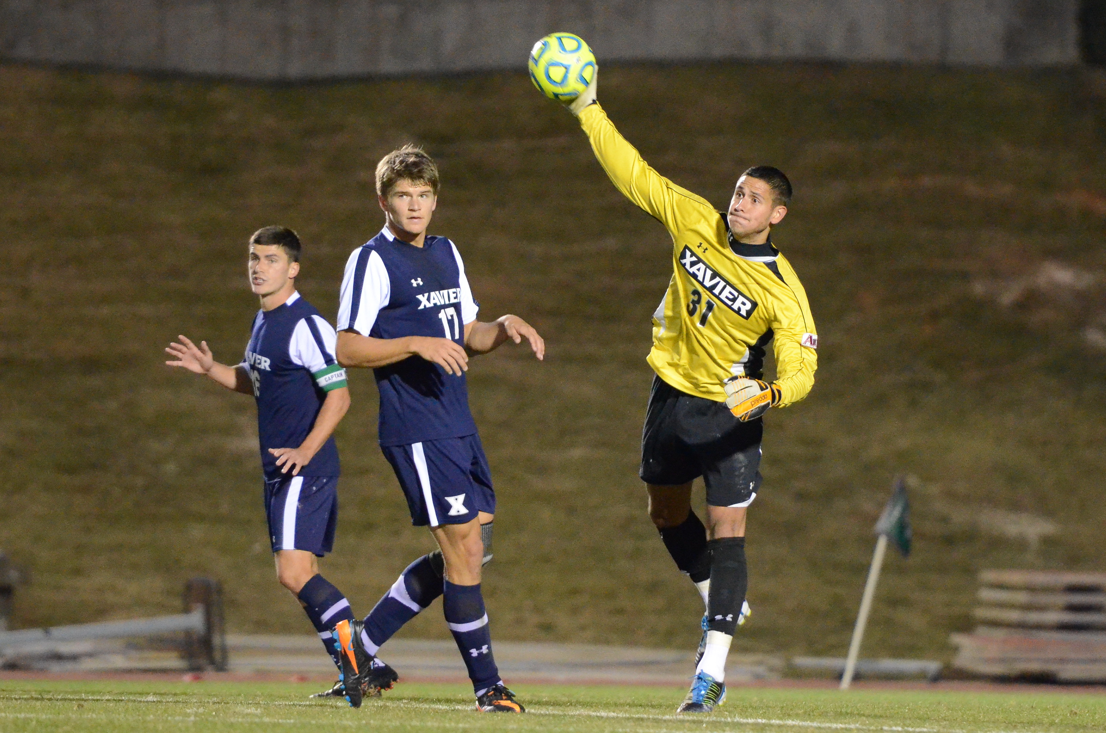 Xavier #31 Justin Marshall, #17 Nick Hagglund, #16 James Queree